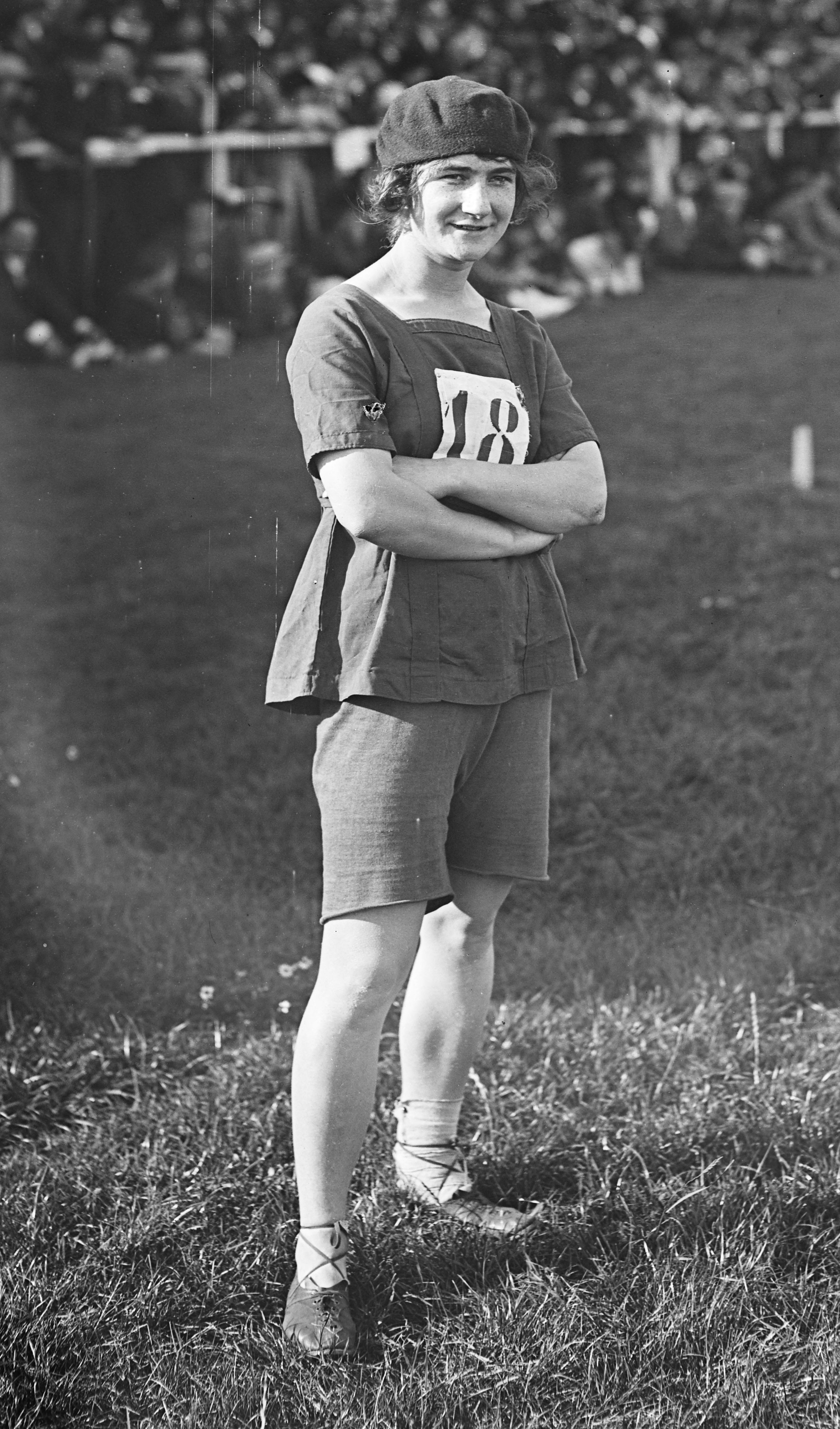 Mlle Germaine Delapierre, 3/10/20, gagnante du 80 m plat, stade Elisabeth.